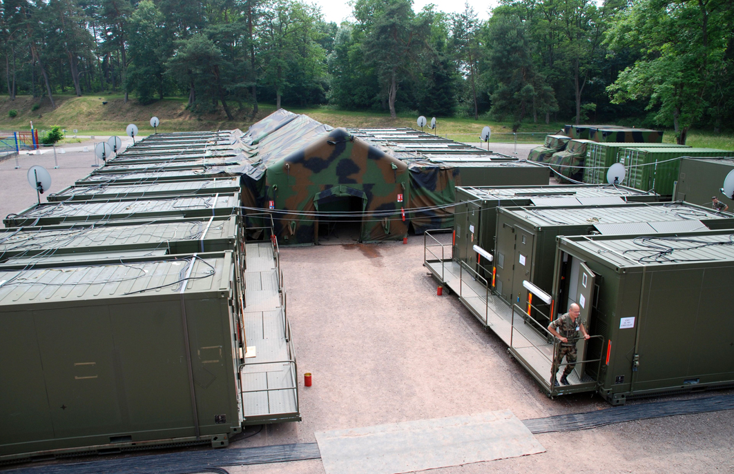 PC déployé lors d'un exercice du Corps de Réaction Rapide - France.